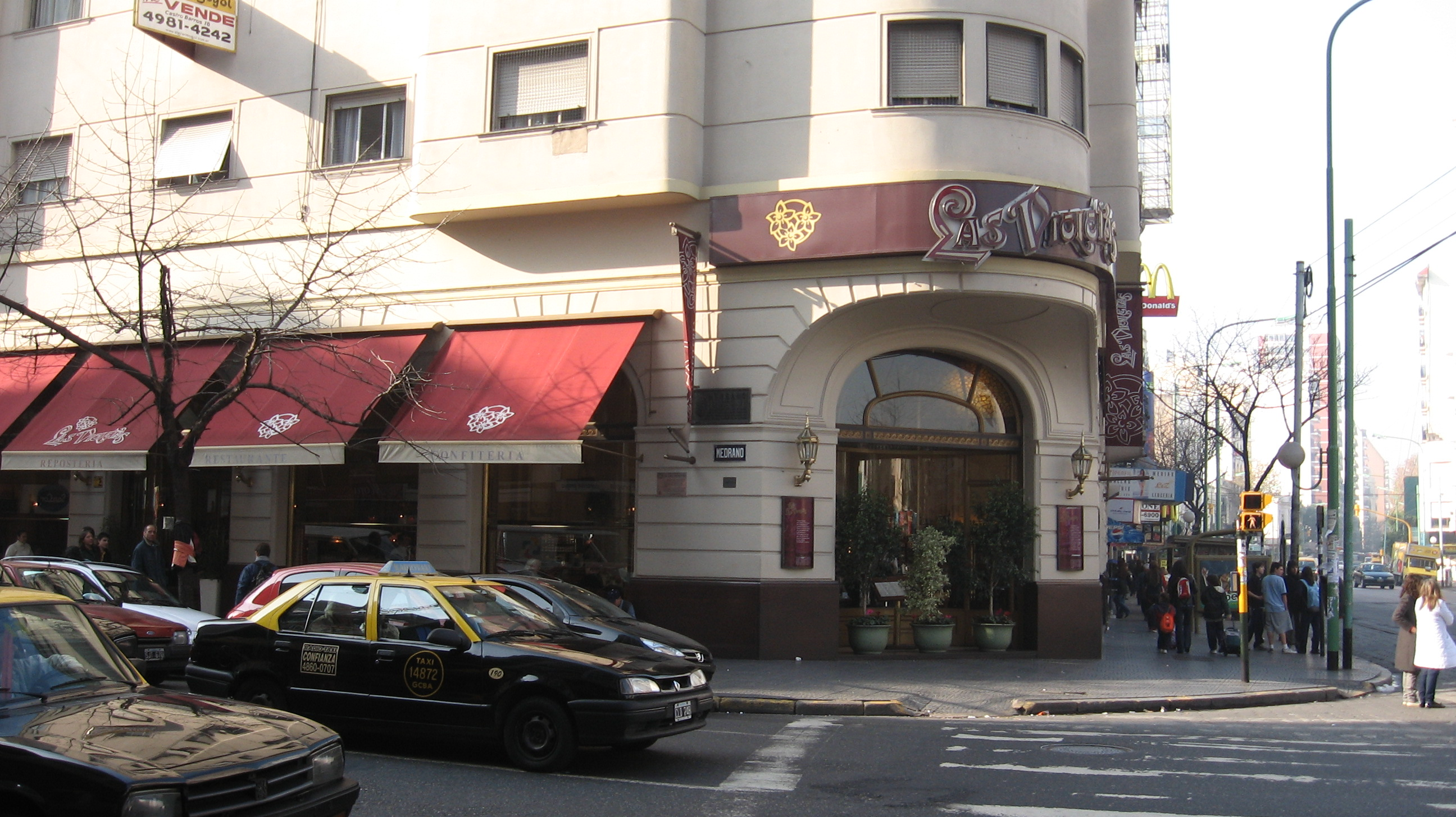 Café "Las Violetas", situado en Medrano y Rivadavia, en la ciudad de Buenos Aires. Café fundado en 1884